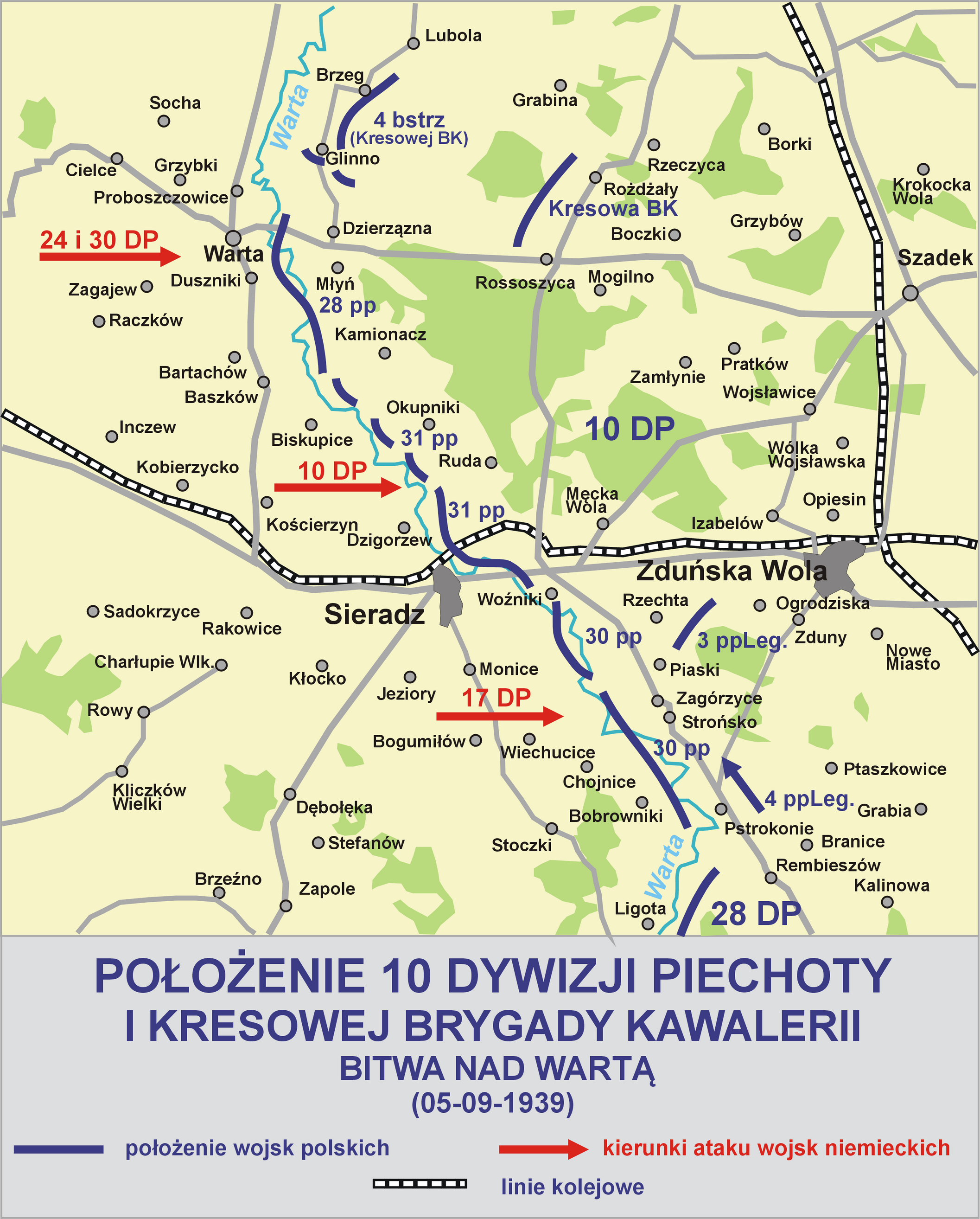 Położenie 10 Dywizji Piechoty i Kresowej Brygady Kawalerii - Bitwa nad Wartą - 05-09-1939